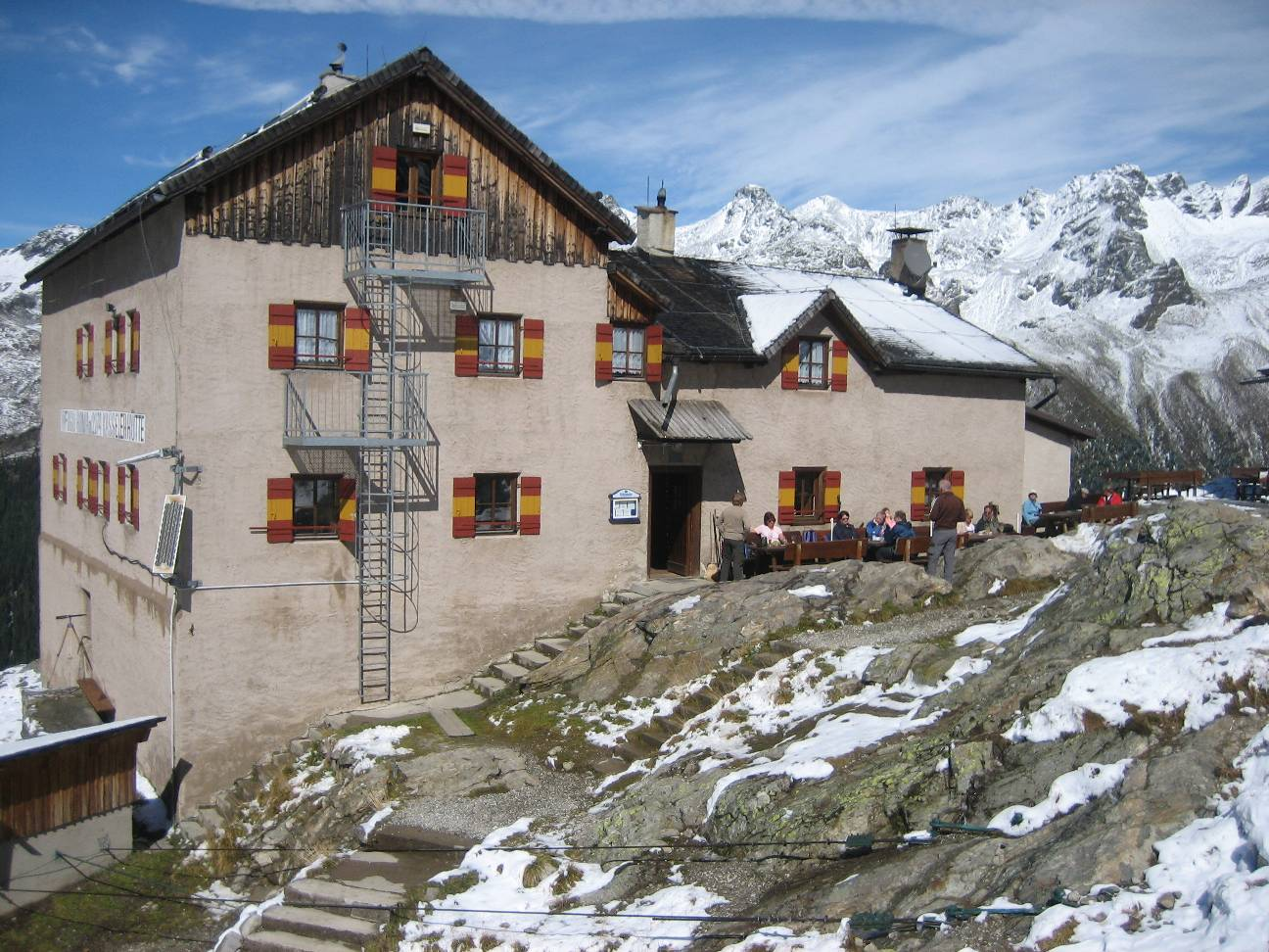 Hochgallhütte (alte Kasseler Hütte, Refugio Roma) in Südtirol